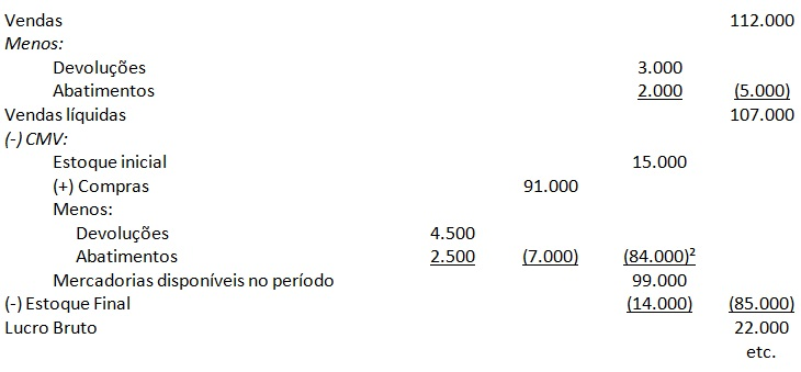 Exemplo retirado do livro para fins acadêmicos, Todos os direitos reservados